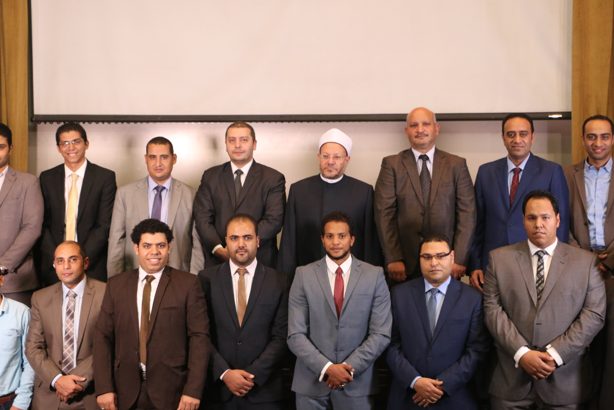 مفتي الجمهورية مع بعض العاملين